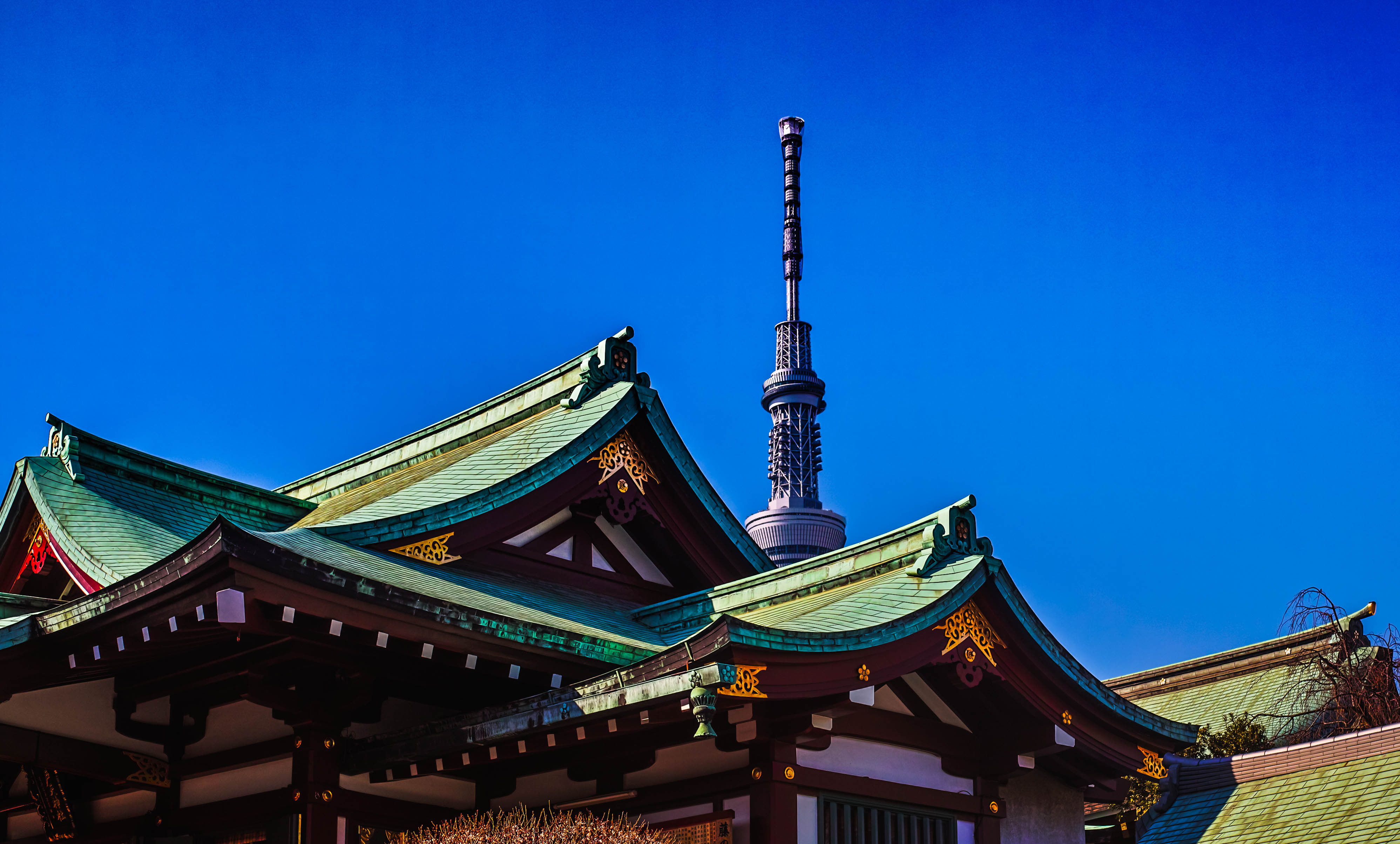 亀戸天神とスカイツリー